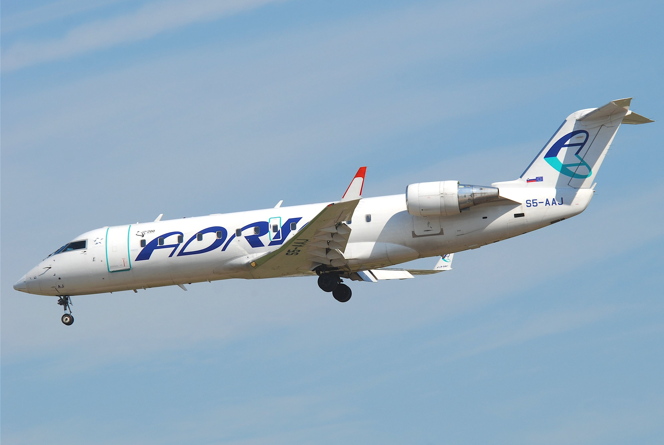 Adria Airways Canadair CRJ200ER; S5-AAJ@FRA;06.07.2011/603fl